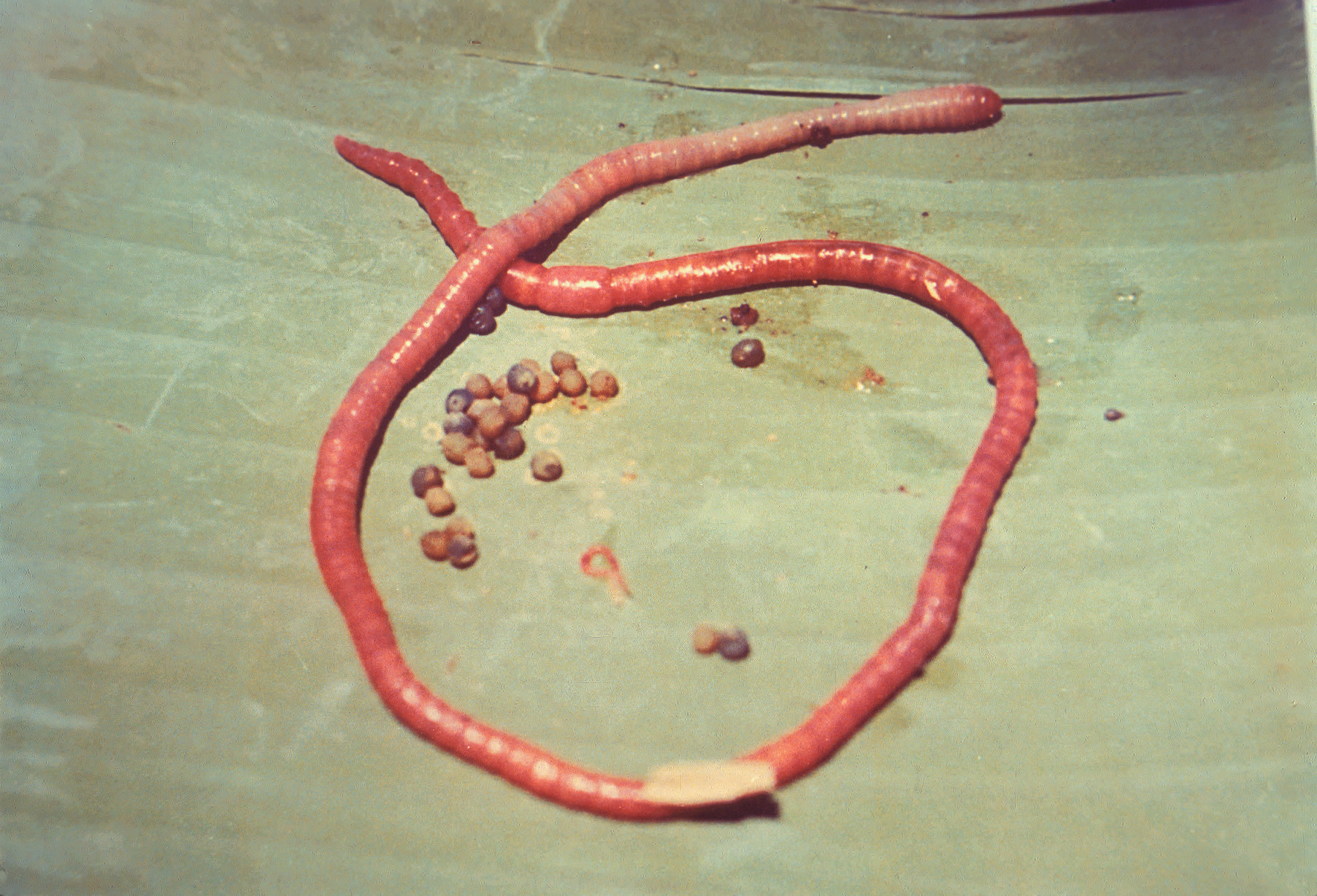 Ver de terre tropical